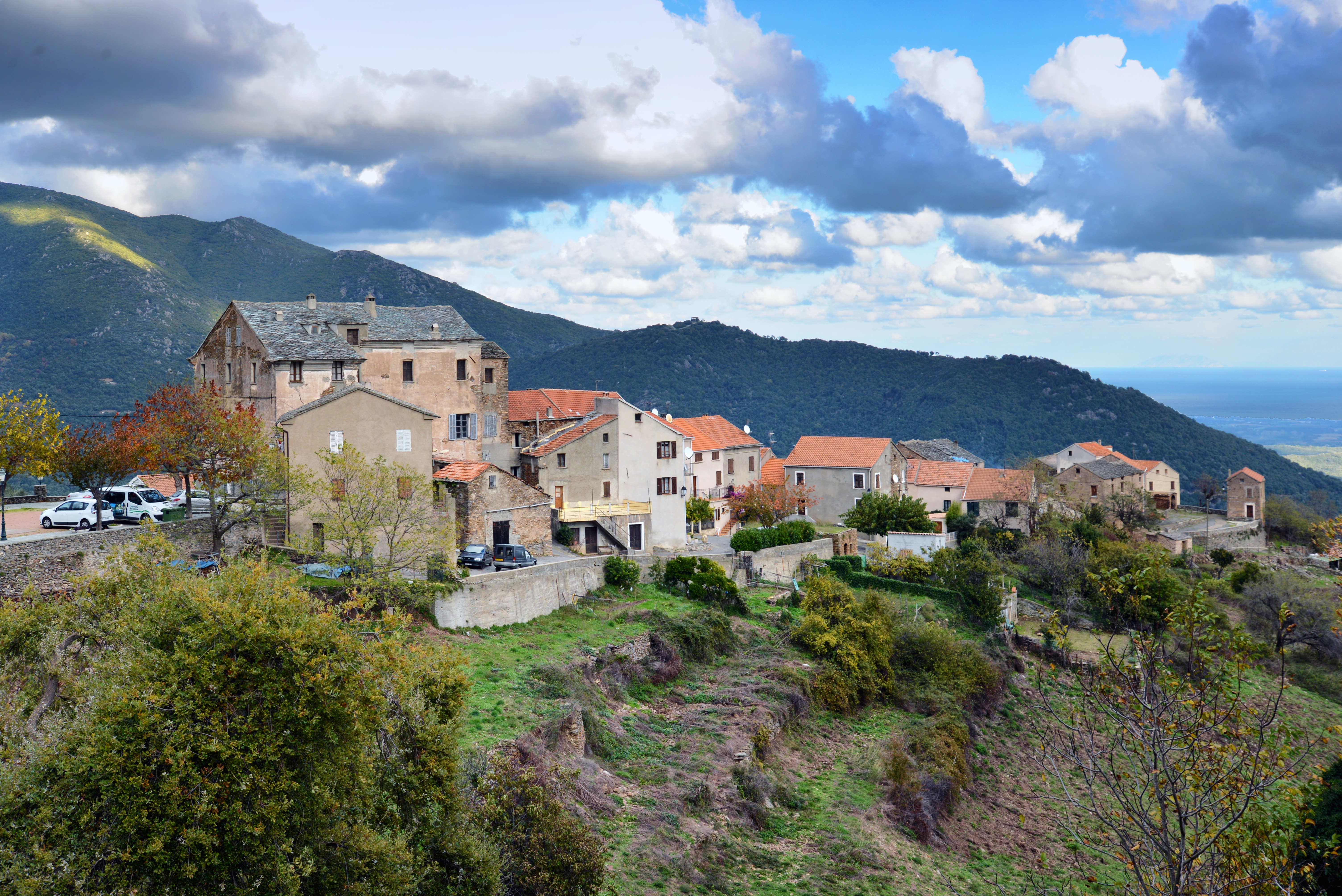 Tallone, Serra (Corse) - Vue du bas du village. À gauche, la mairie et la place de l'église